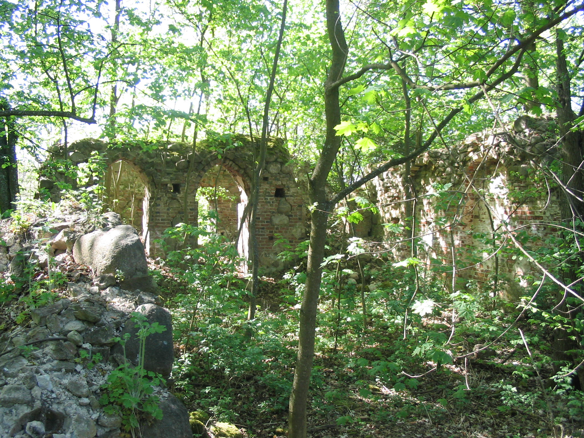 ruiny koscioła w Garbnie (Garbonii)